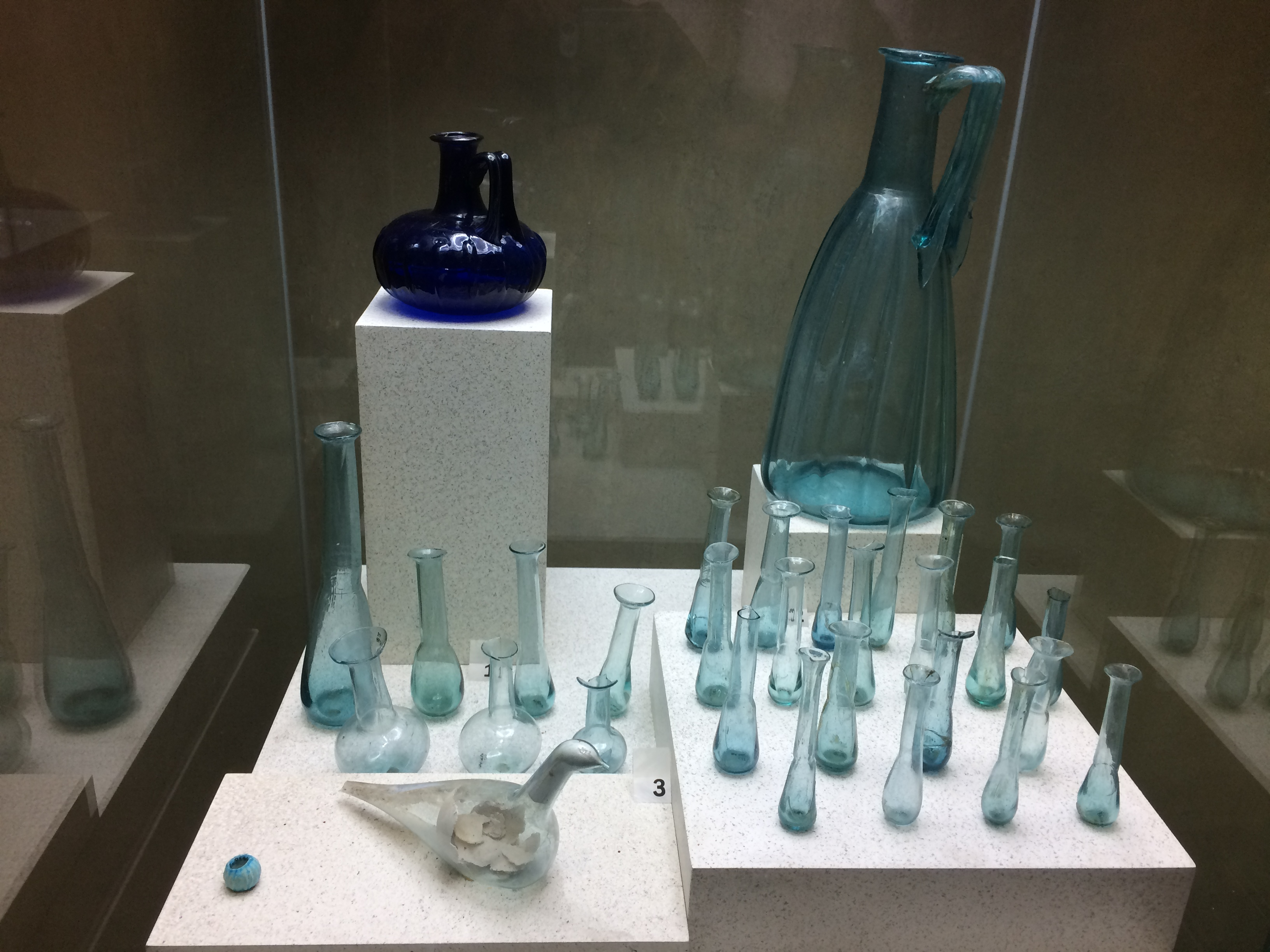 Museo civico e archeologico Locarno (Schweiz), Glas aus der Römerzeit